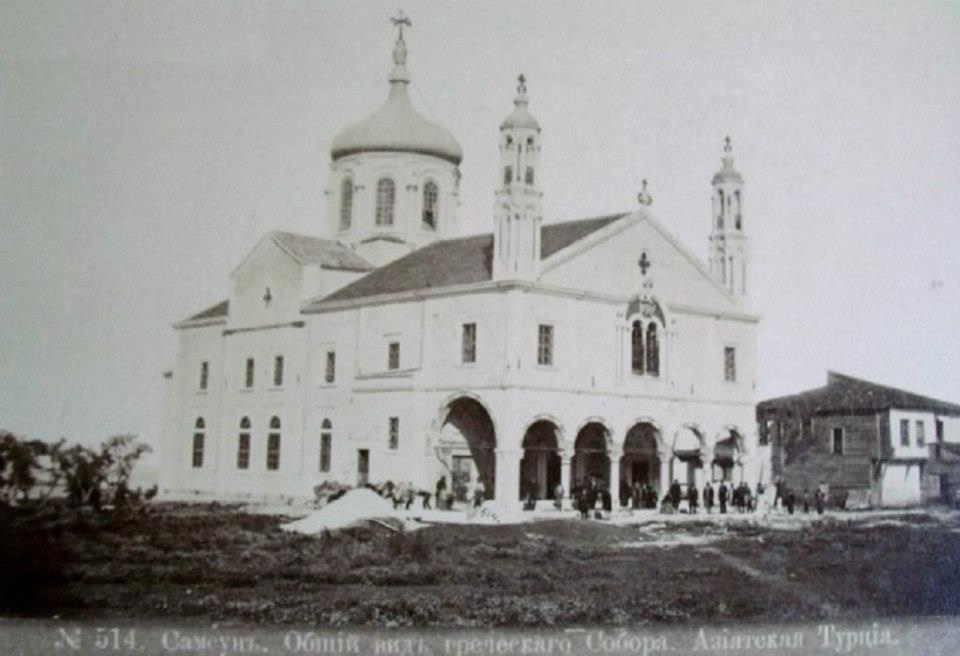 Samsun'da artık var olmayan Aya Triada Ortodoks Kilisesi'nin profilden görünümü. Kilisenin bulunduğu alanda kilise yıkıldıktan sonra Maarif Koleji inşa edilmiştir. Maarif Koleji'nin günümüzdeki adı 23 Nisan İlkokulu'dur.